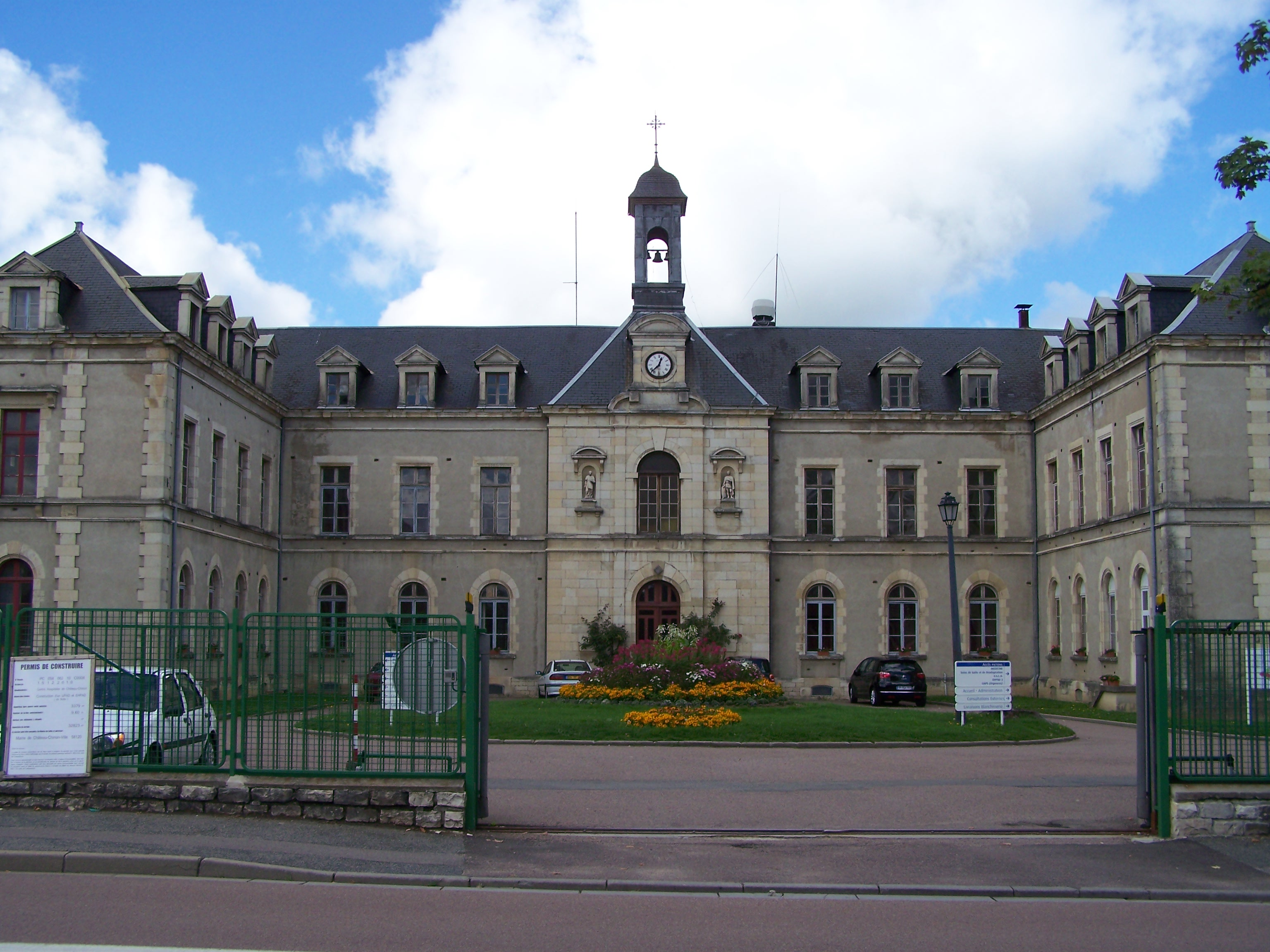 Hôpital Aligre de Château-Chinon (Ville) (Nièvre, France).